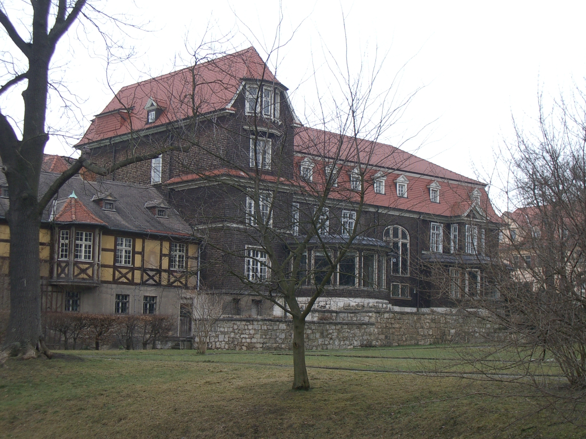 Gut Holzdorf